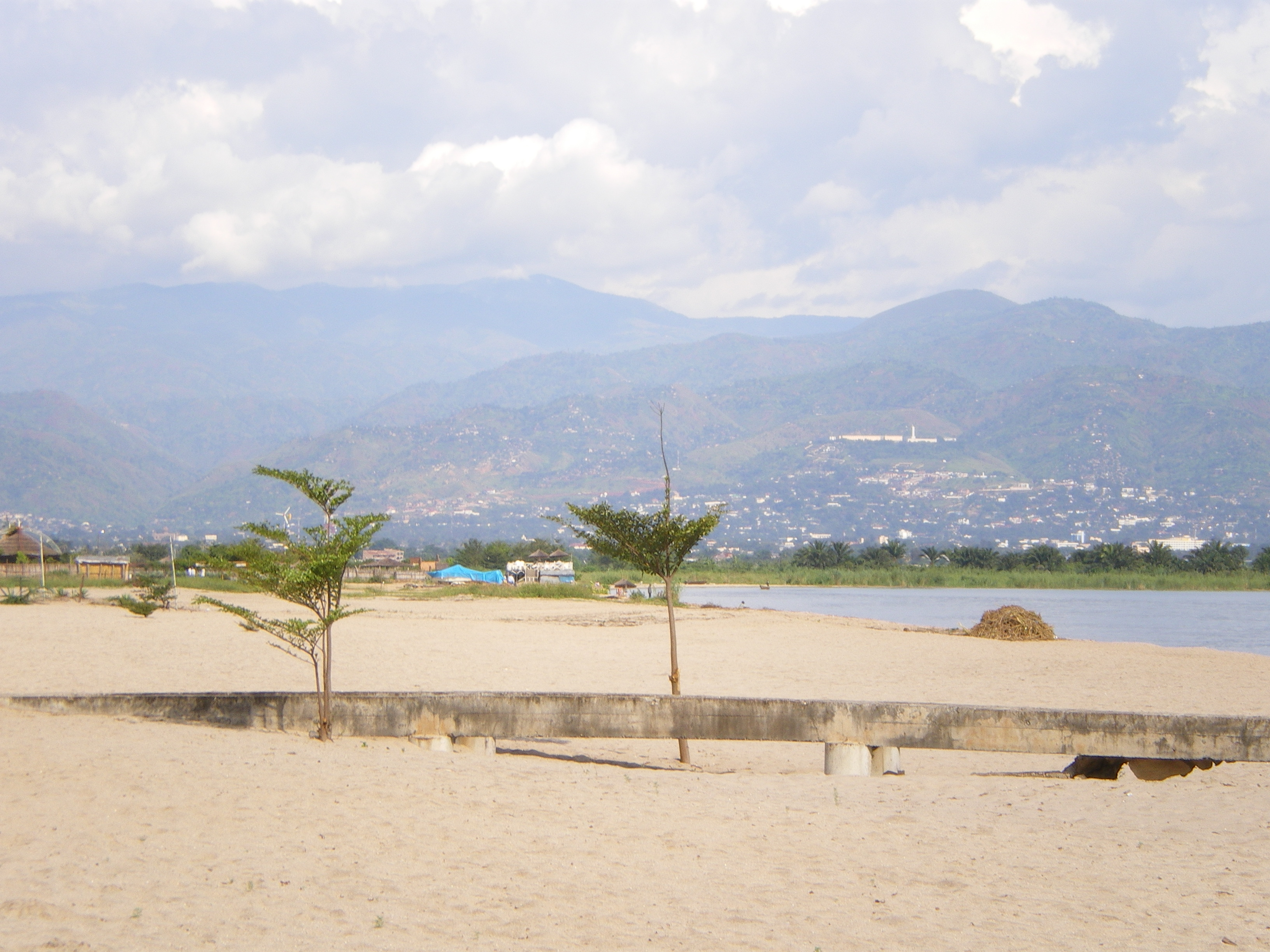 Lake Tanganyika (Burundi) (Hubert Schonberg)